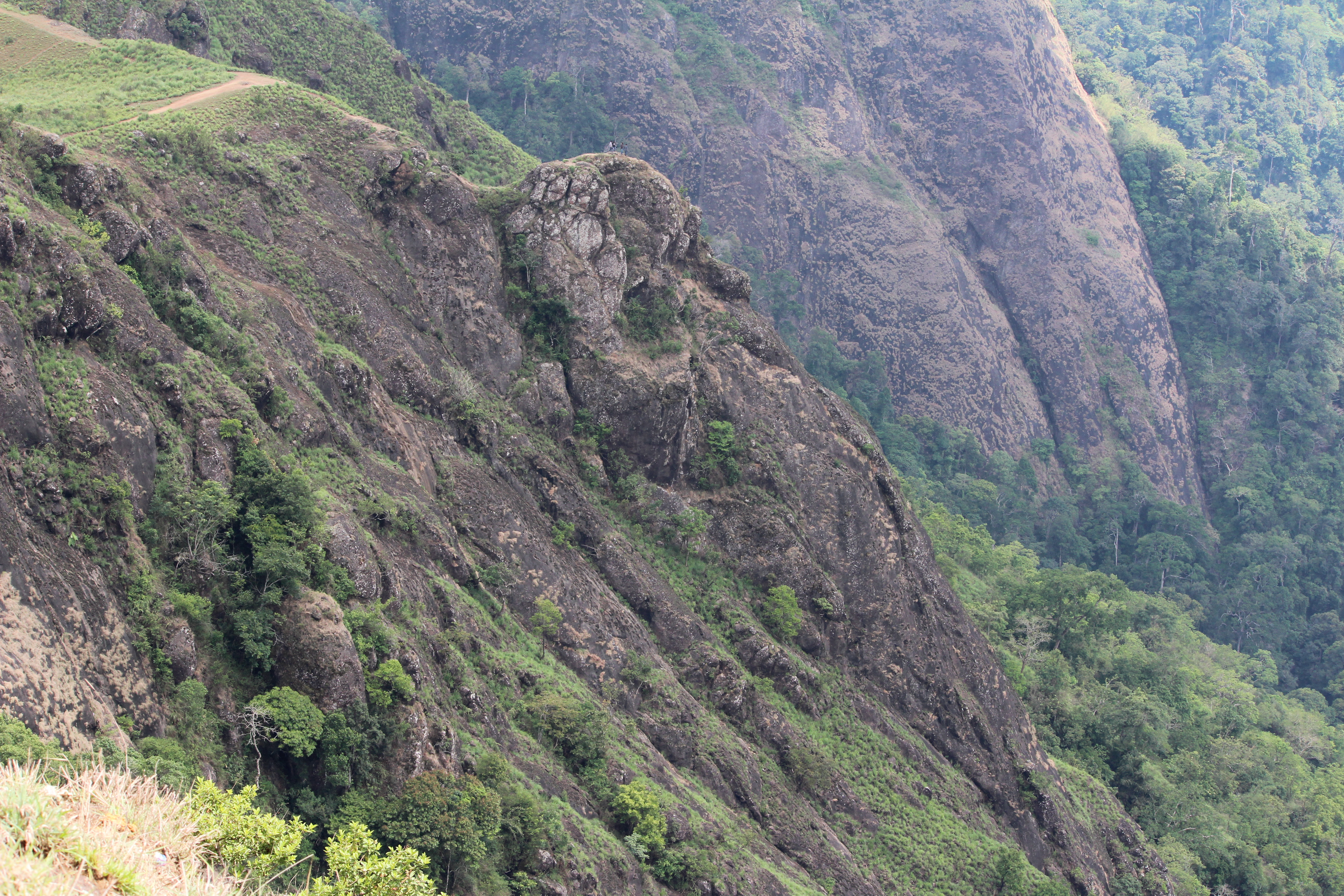 പരുന്തും പാറ